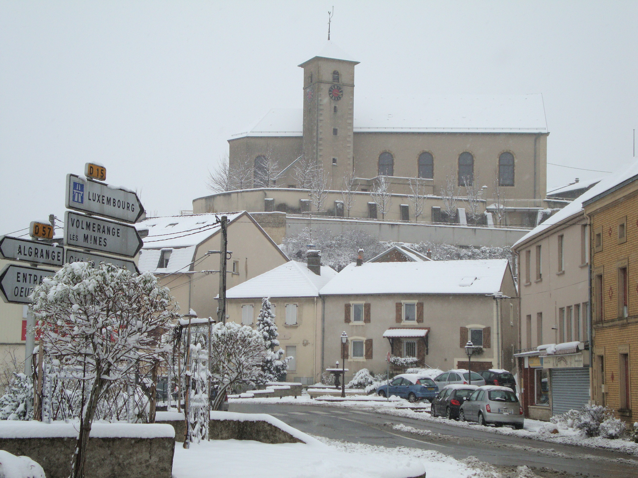 Centre-ville d'Hettange-Grande (57) en hiver...